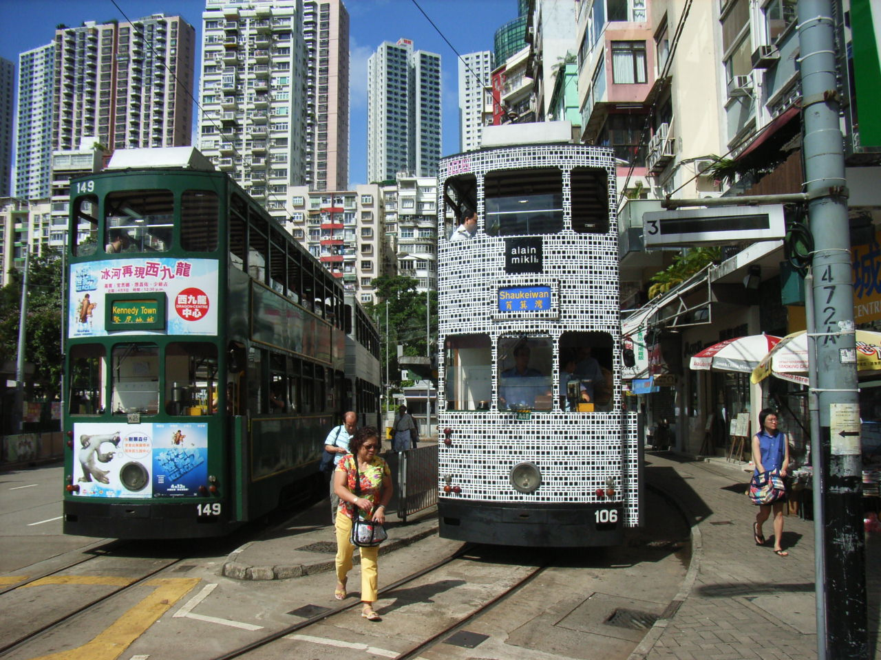 跑馬地電車總站，車來自香港島東西兩邊，包括港島西面的zh:堅尼地城，及東面的zh:筲箕灣 Author: BEVERLYSHEN